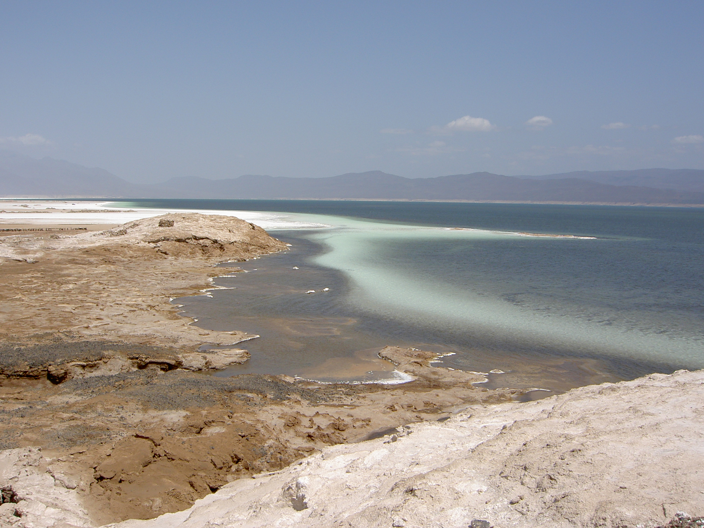 Lake Assal, Djibouti